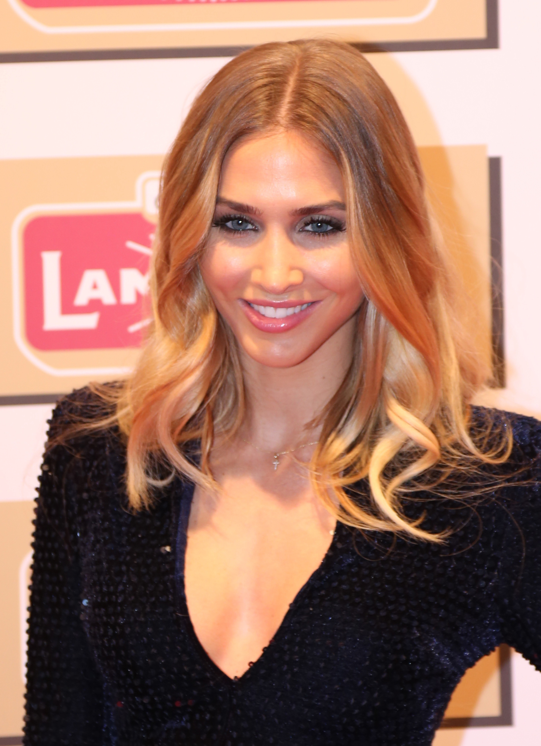 Ann-Kathrin Brömmel bei der Lambertz Monday Night 2017.